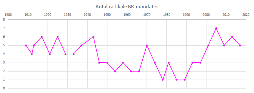 Antal mandater valgt til Borgerrepræsentationen for Det Radikale Venstre siden 1909. Bemærk at der ved valgene i 1909 og 1912 kun var 42 pladser, og at der siden 1913 har været 55.